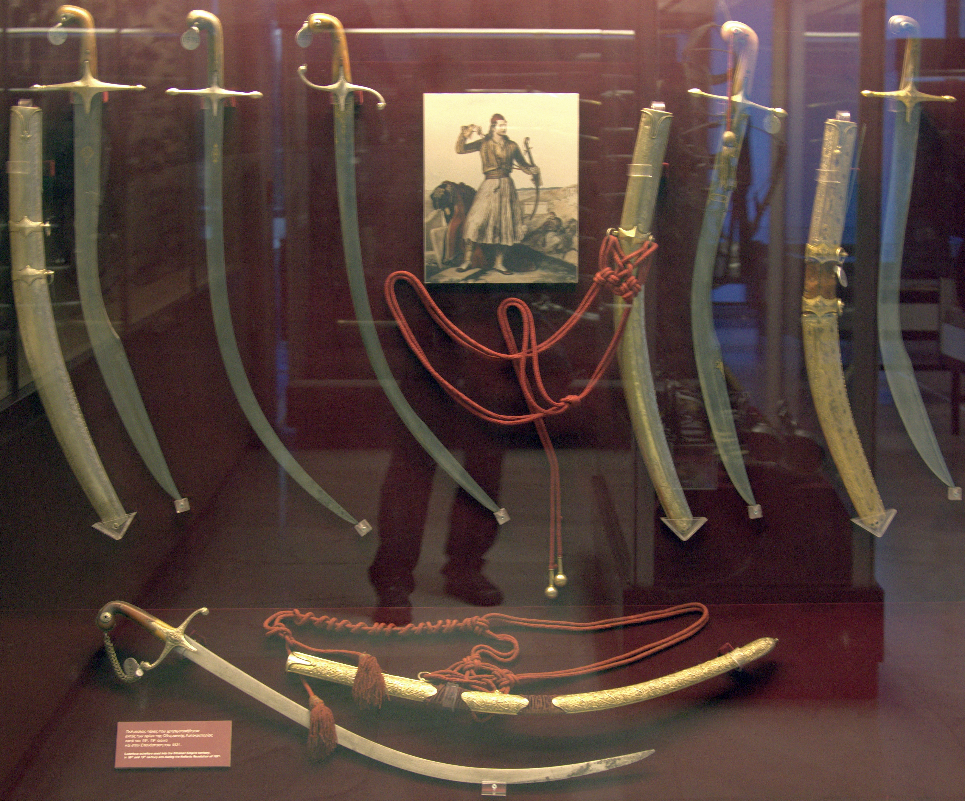 Hellenic War Museum (Athens, Greece). --- Πολυτελείς πάλες που χρησιμοποιήθηκαν εντός των ορίων της Οιωμανικής Αυτοκρατορίας κατά τον 18ο, 19ο αιώνα και στην Επανάσταση του 1821. Πολεμικό Μουσείο Ελλάδος. Αθήνα.